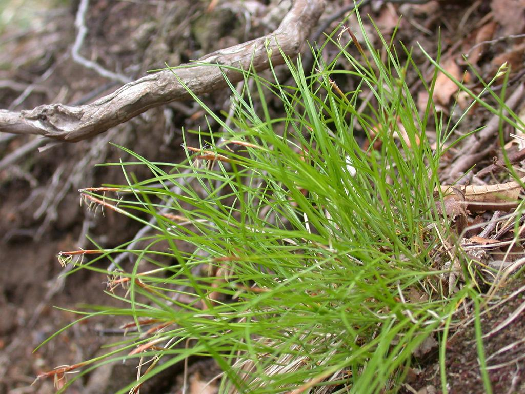 Carex grallatoria (Cyperaceae) ヒナスゲ 2005.05.05 和歌山県田辺市法師山 Mt. Housi, Tanabe city Wakayama pref. Japan